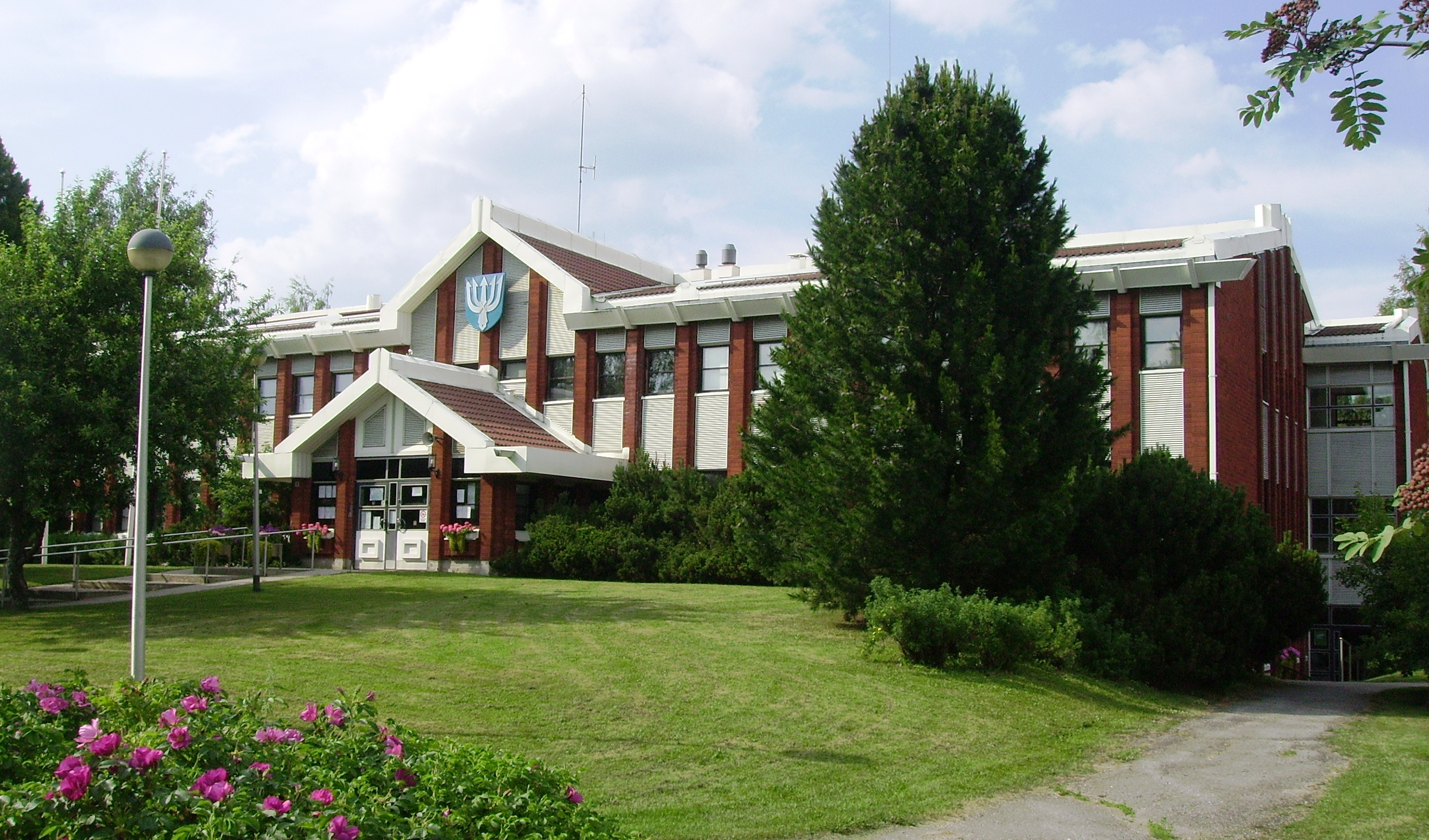 Reisjärvi stadshus i Reisjärvi Österbotten.